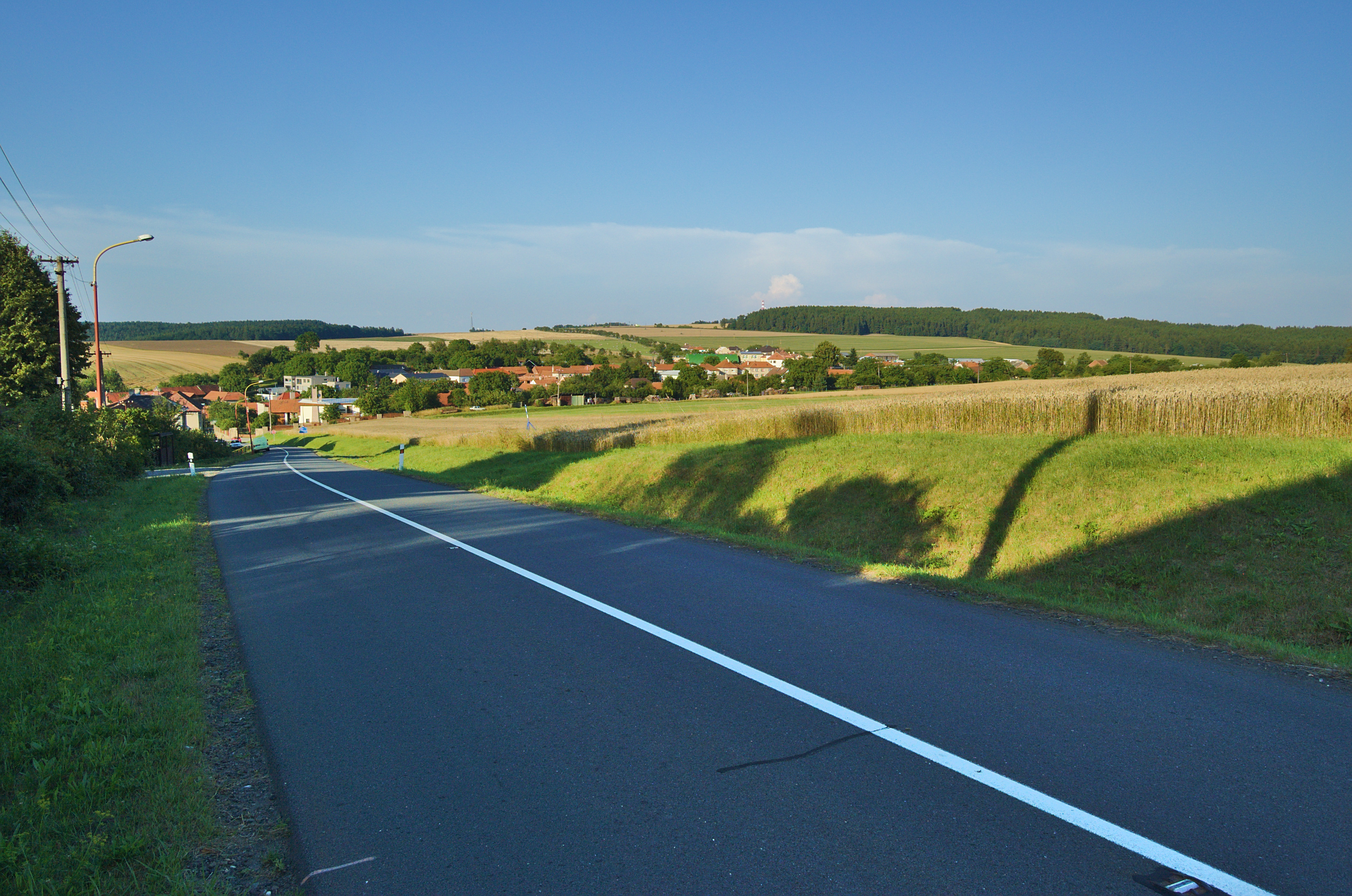 Pohled na obec od jihu z hlavní silnice na Konici, Hvozd, okres Prostějov